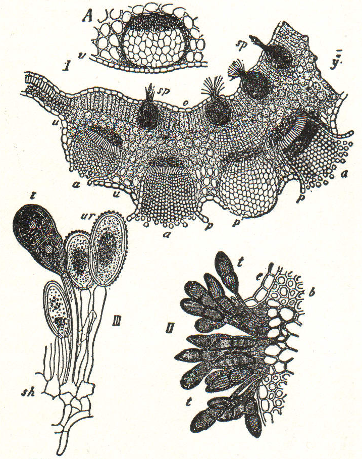 Aeciciomycetes